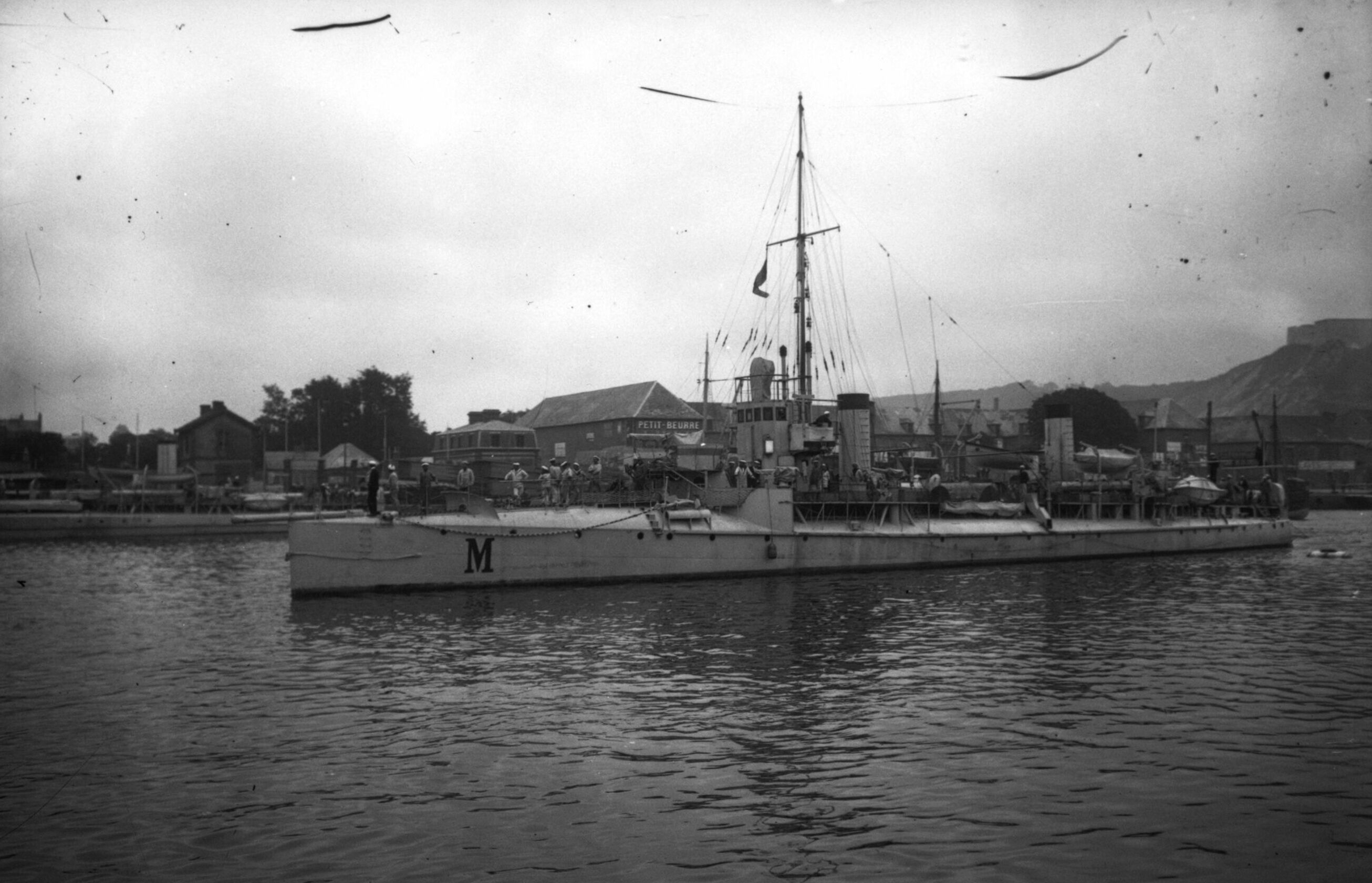 Le Mortier, contre-torpilleur [le 31 juillet 1909 à Cherbourg, lors de la revue navale et de l'entrevue entre le président Fallières et le tsar Nicolas II] : [photographie de presse] / [Agence Rol]